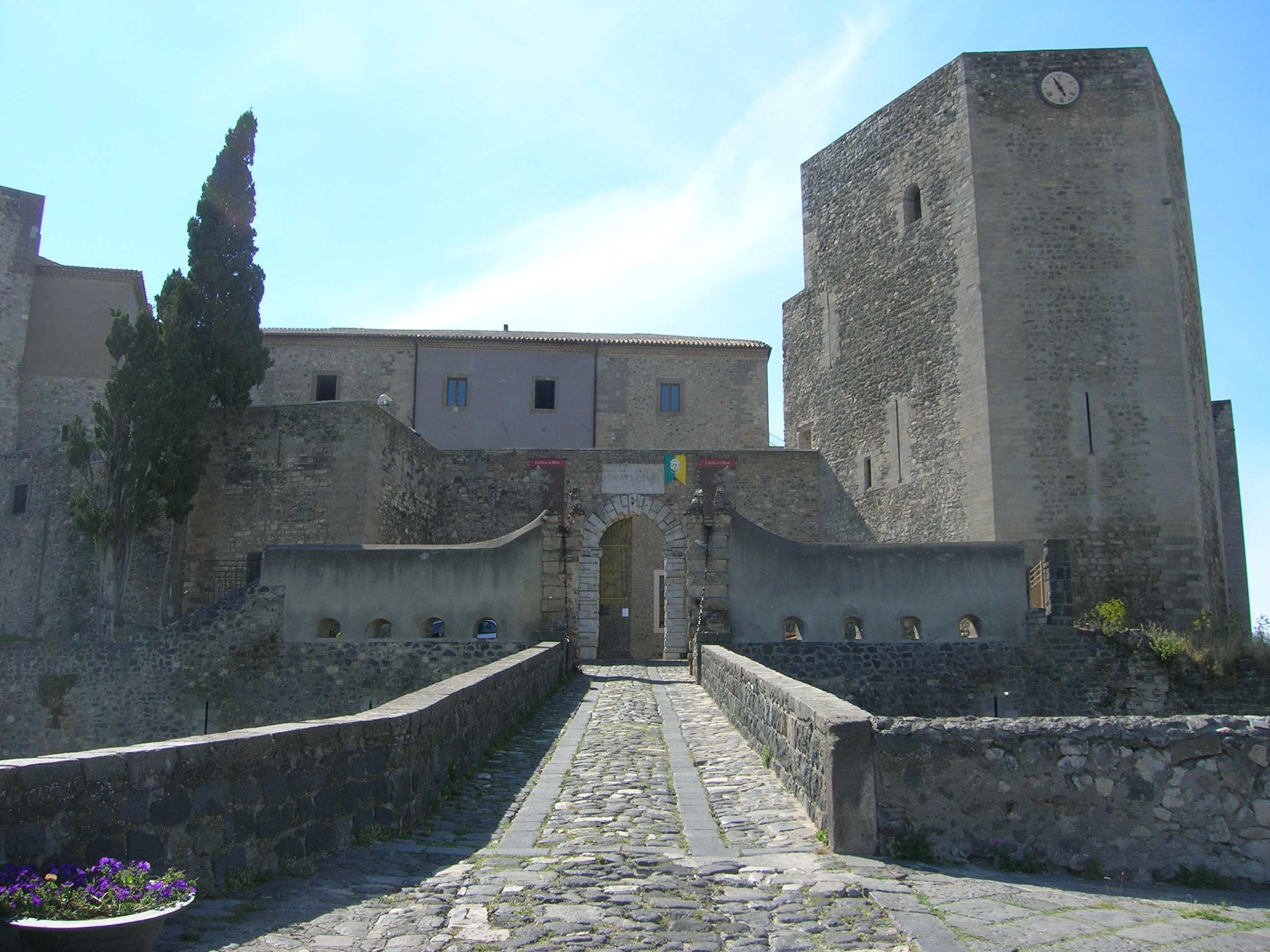 Castello di Melfi, Basilicata